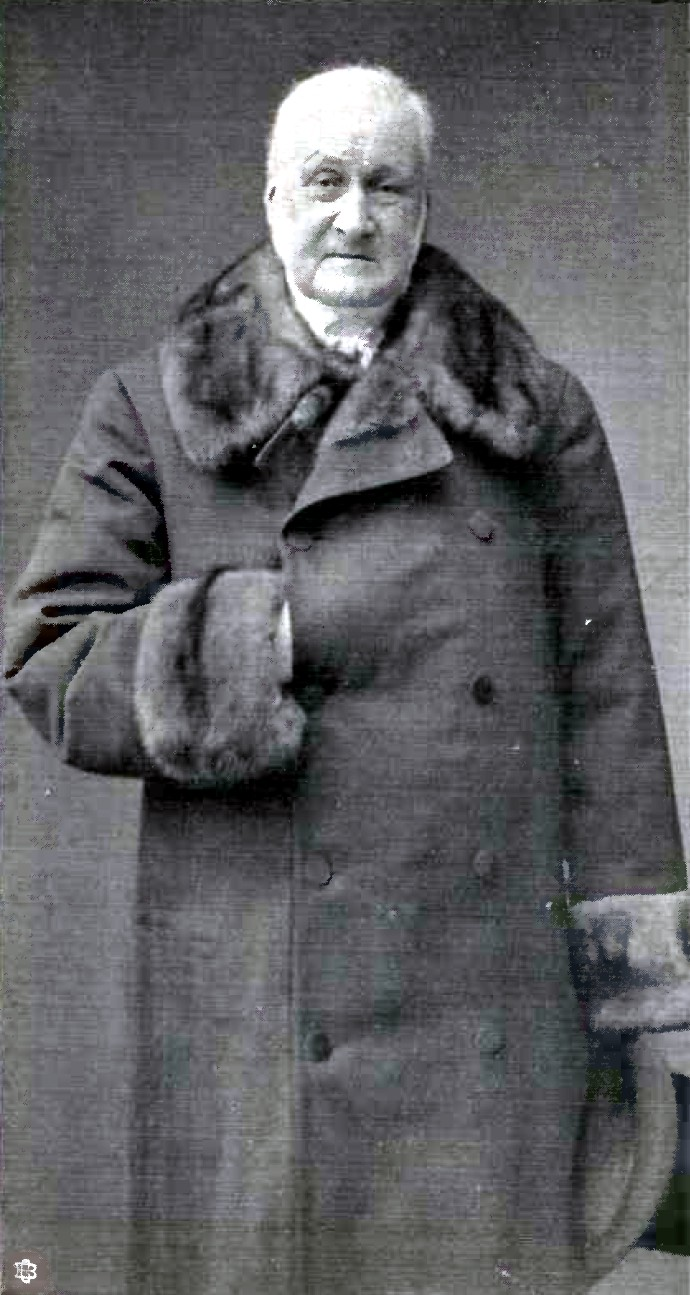 Konsul H. L. Behncke.